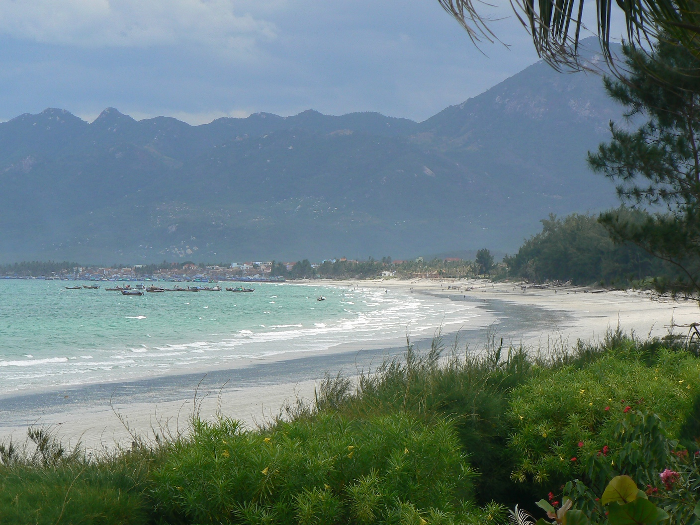 Place de Doc Let, près de Nha Trang